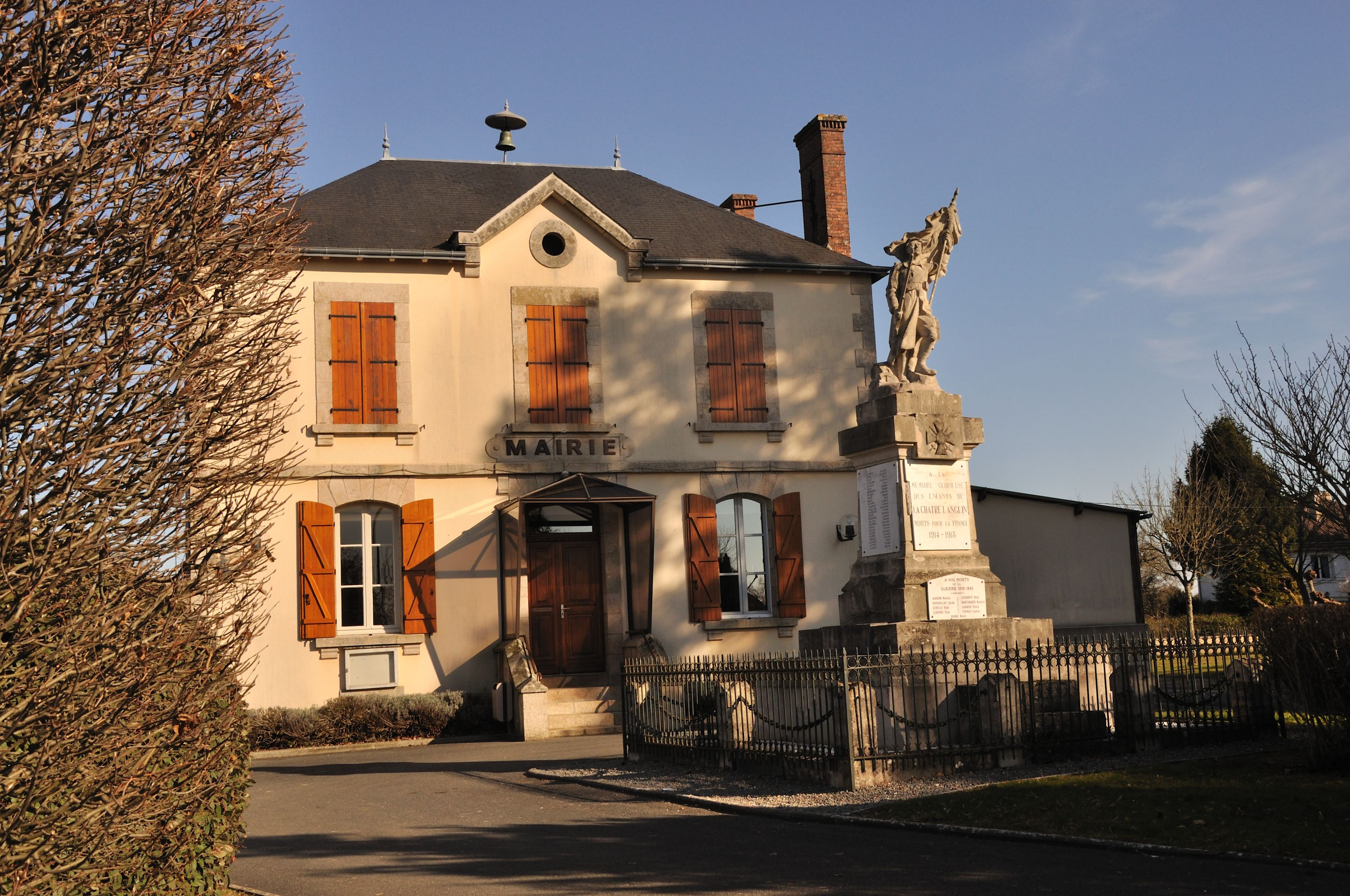 La Châtre-l'Anglin (Indre) - Mairie et Monument aux morts